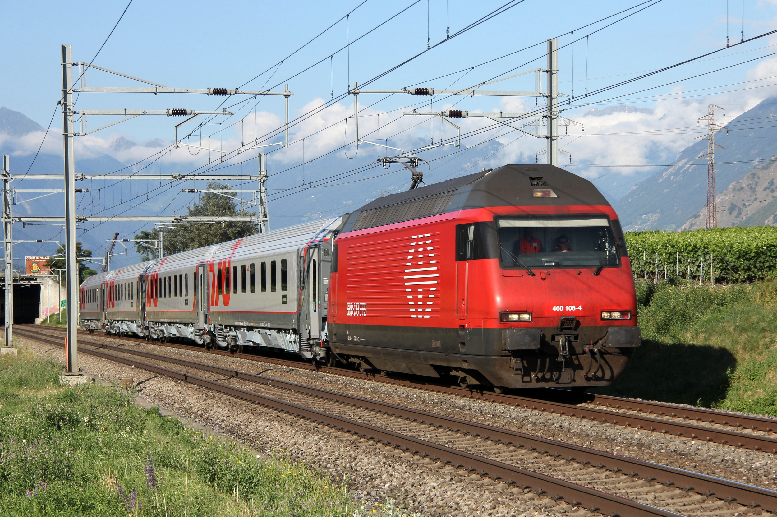 Durant l'été 2012, des voitures des chemins de fer russes (RZD) ont été testées en Suisse. Ici, la Re 460 108-4 des CFF tracte quatre WLABmz (immatriculées CH-SRTAG WLABmz 62 85 78-90 00X-X pour l'occasion) à travers la plaine du Rhône. Train 97719 Martigny - Sion.